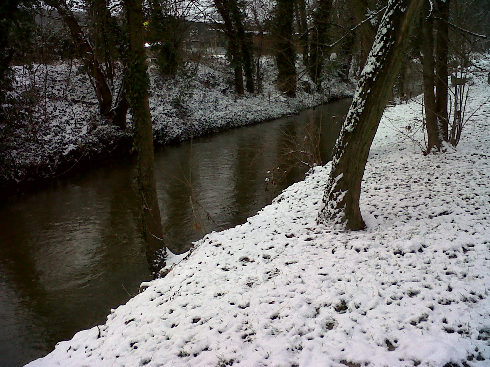 La rivière Yzeron sous la neige à Sainte-Foy-Lès-Lyon (69)